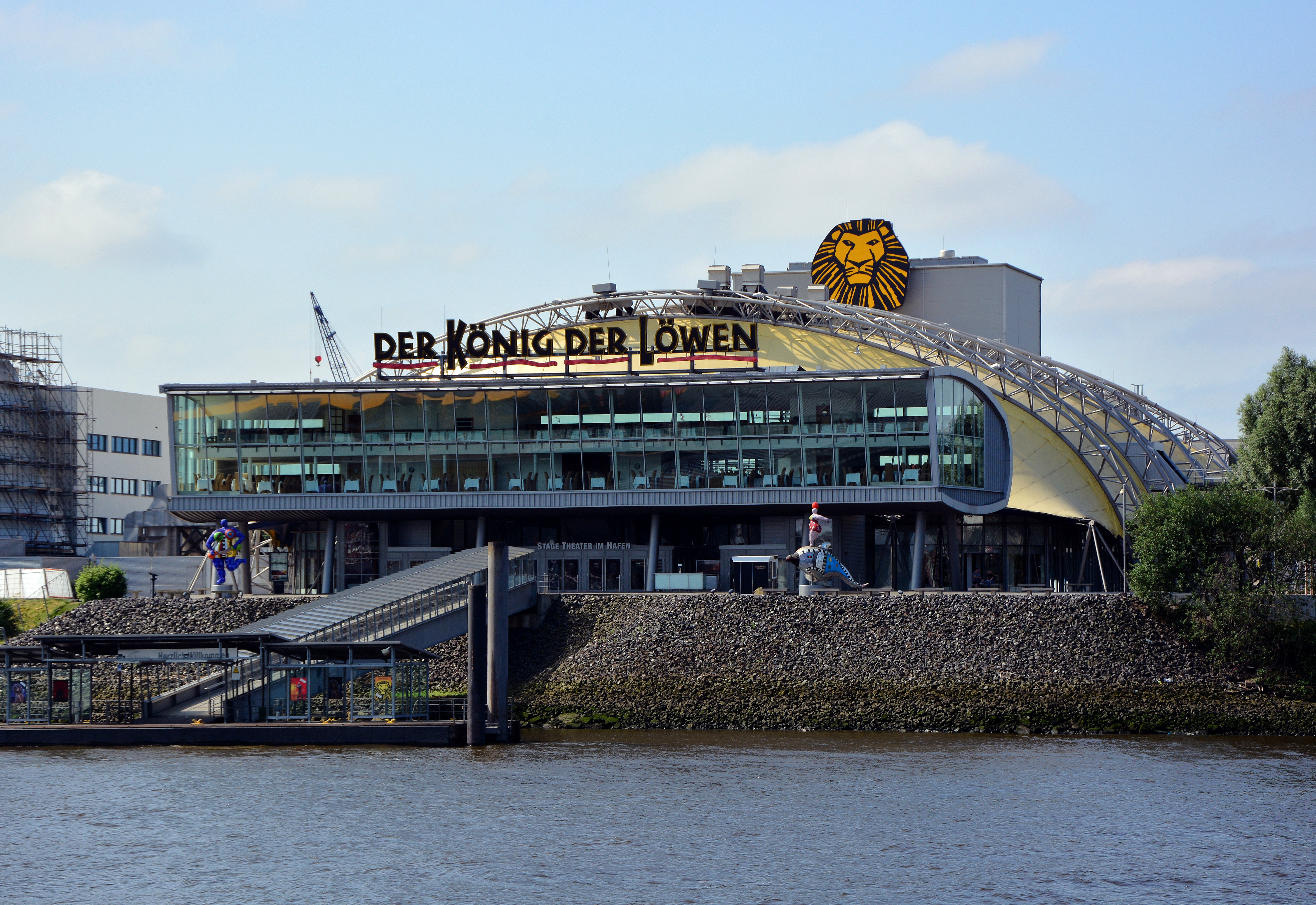 Musicaltheater Der König der Löwen im Hamburger Hafen